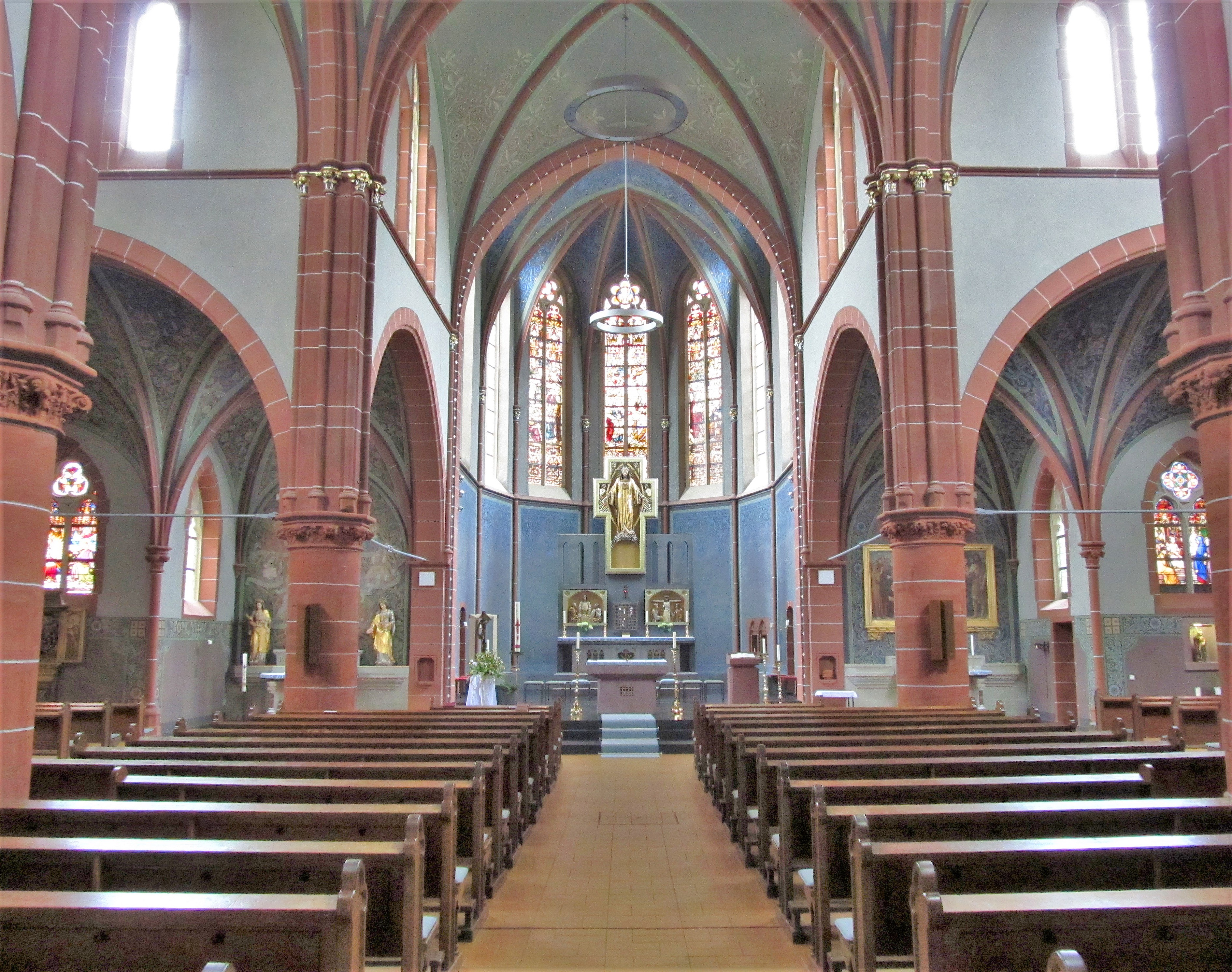 Blick ins Innere der katholischen Pfarrkirche St. Josef in Bildstock, einem Stadtteil von Friedrichsthal (Saar), Regionalverband Saarbrücken, Saarland